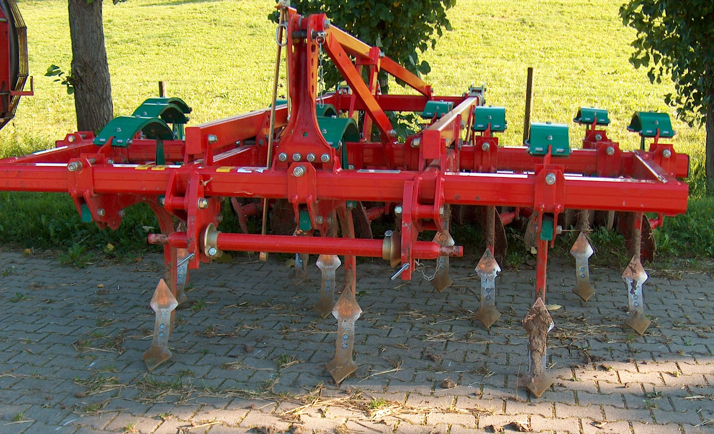 Grubber von Kverneland, Typ CLC, Bj. 2006